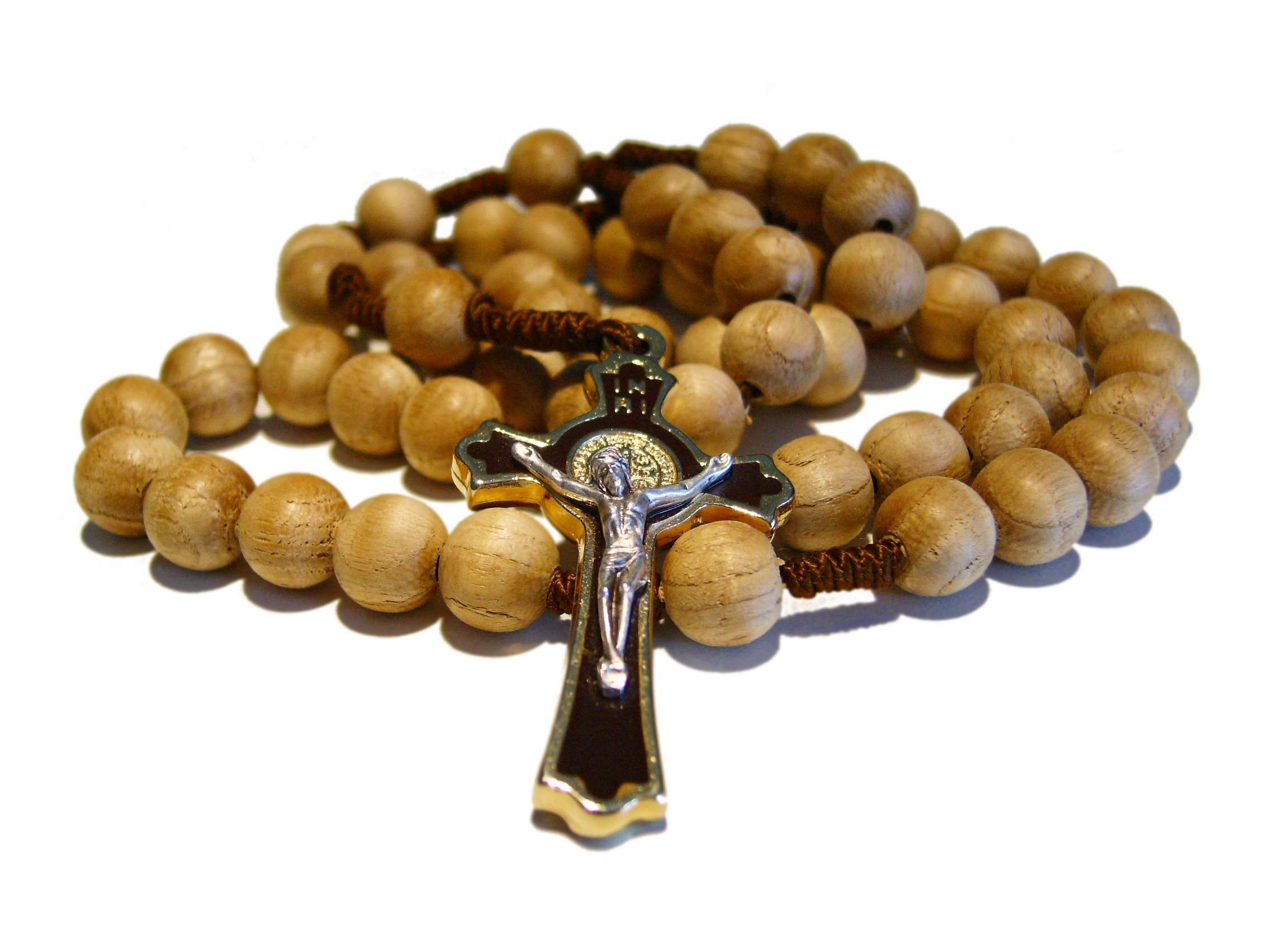 Rosary